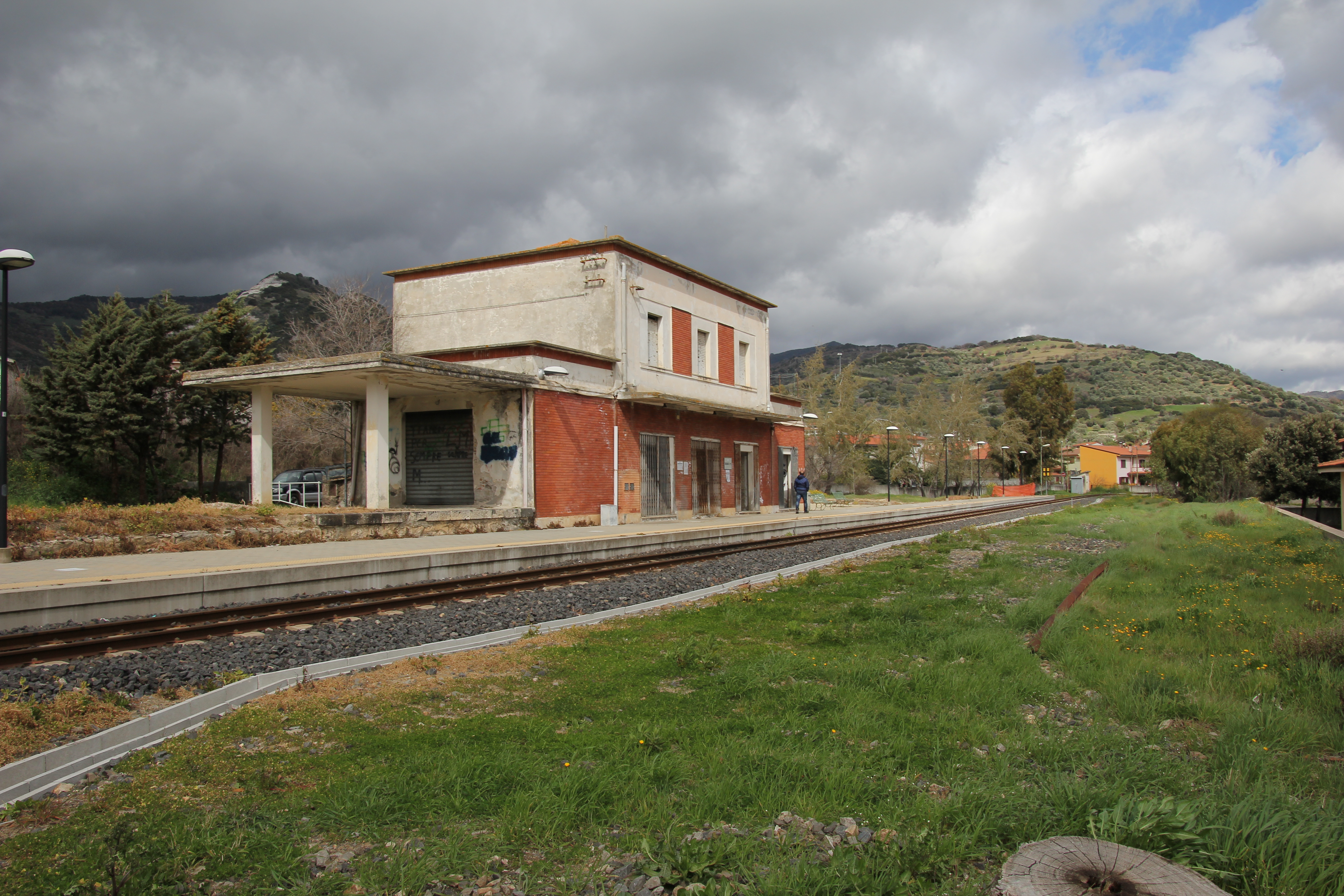 Silanus, stazione ferroviaria